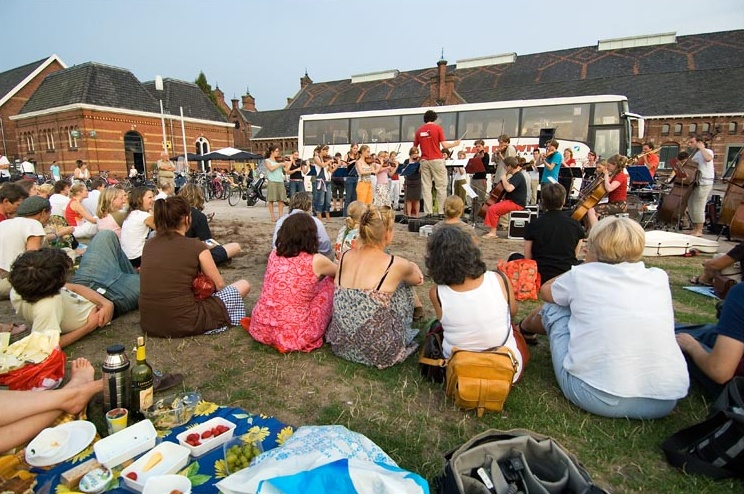 Ricciotti